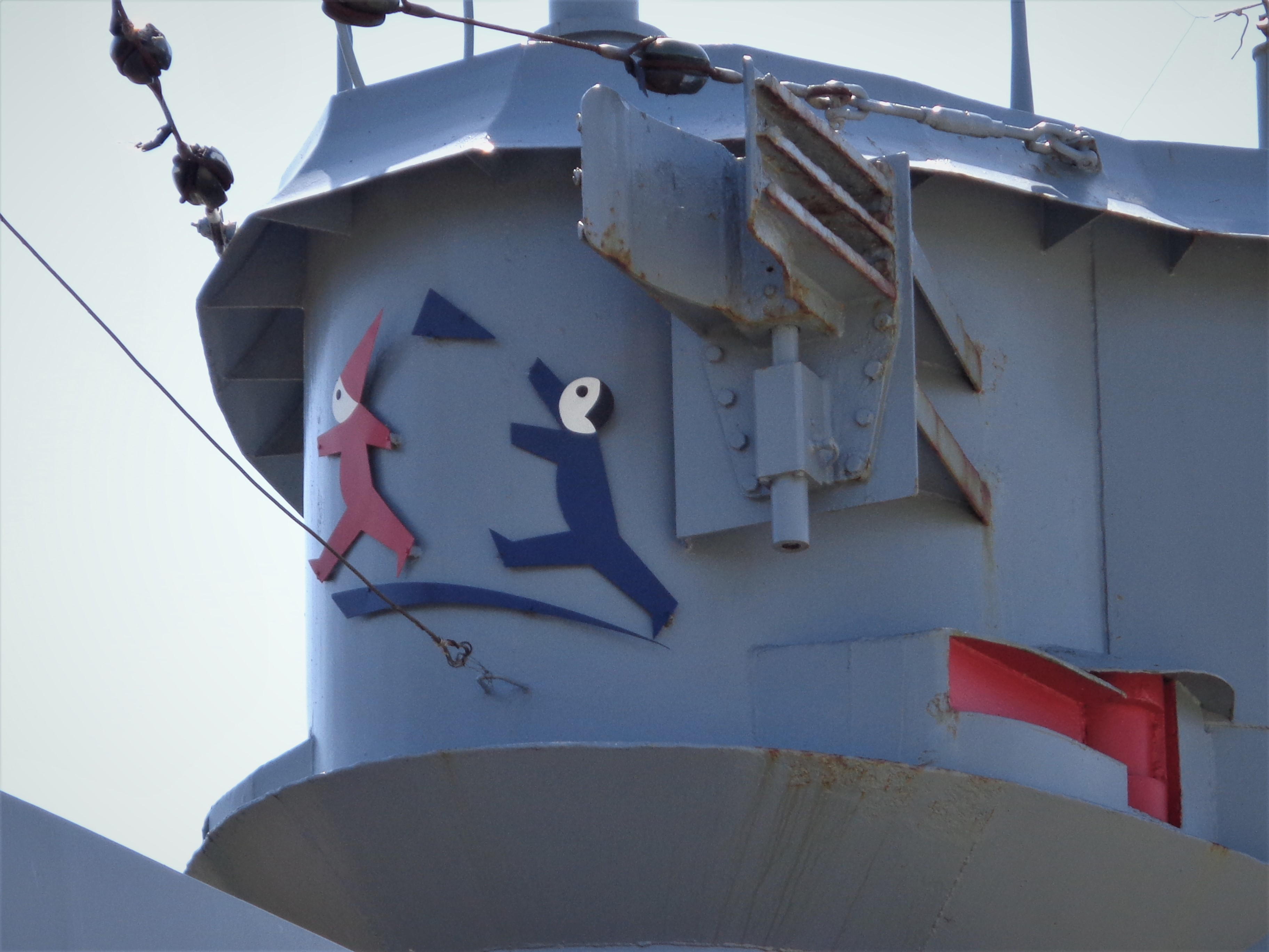 Fang-den-Hut-Maling am Turm des Unterseebootes 995 am Strand von Laboe.